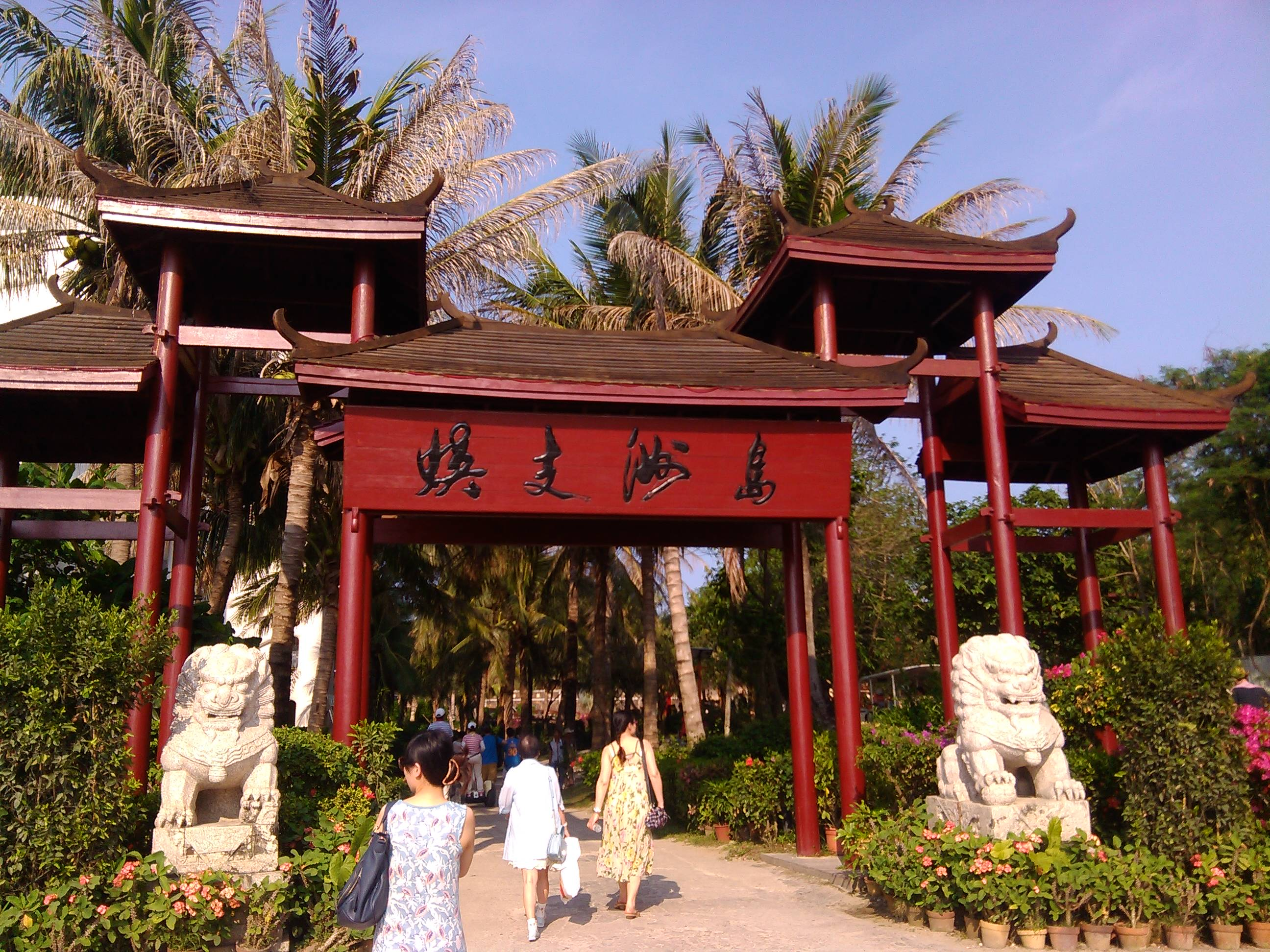 Haitang, Sanya, Hainan, China